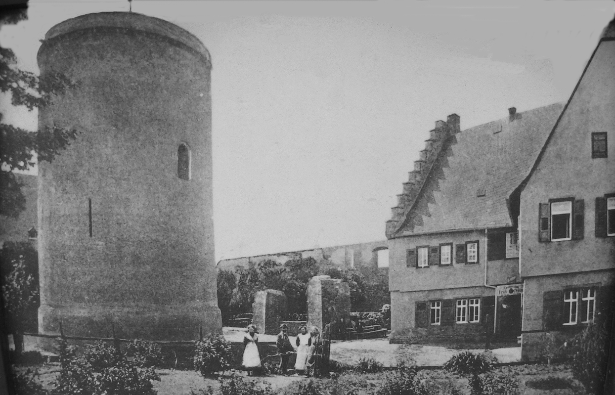 Veste Otzberg - Bergfried und Kommandantenhaus im Jahr 1900